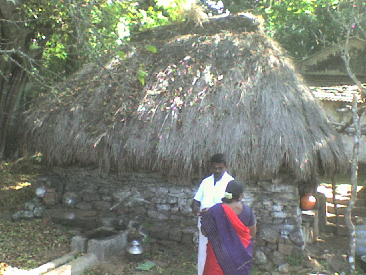 கொல்லிமலை மாசி பெரியசாமி கோயில்